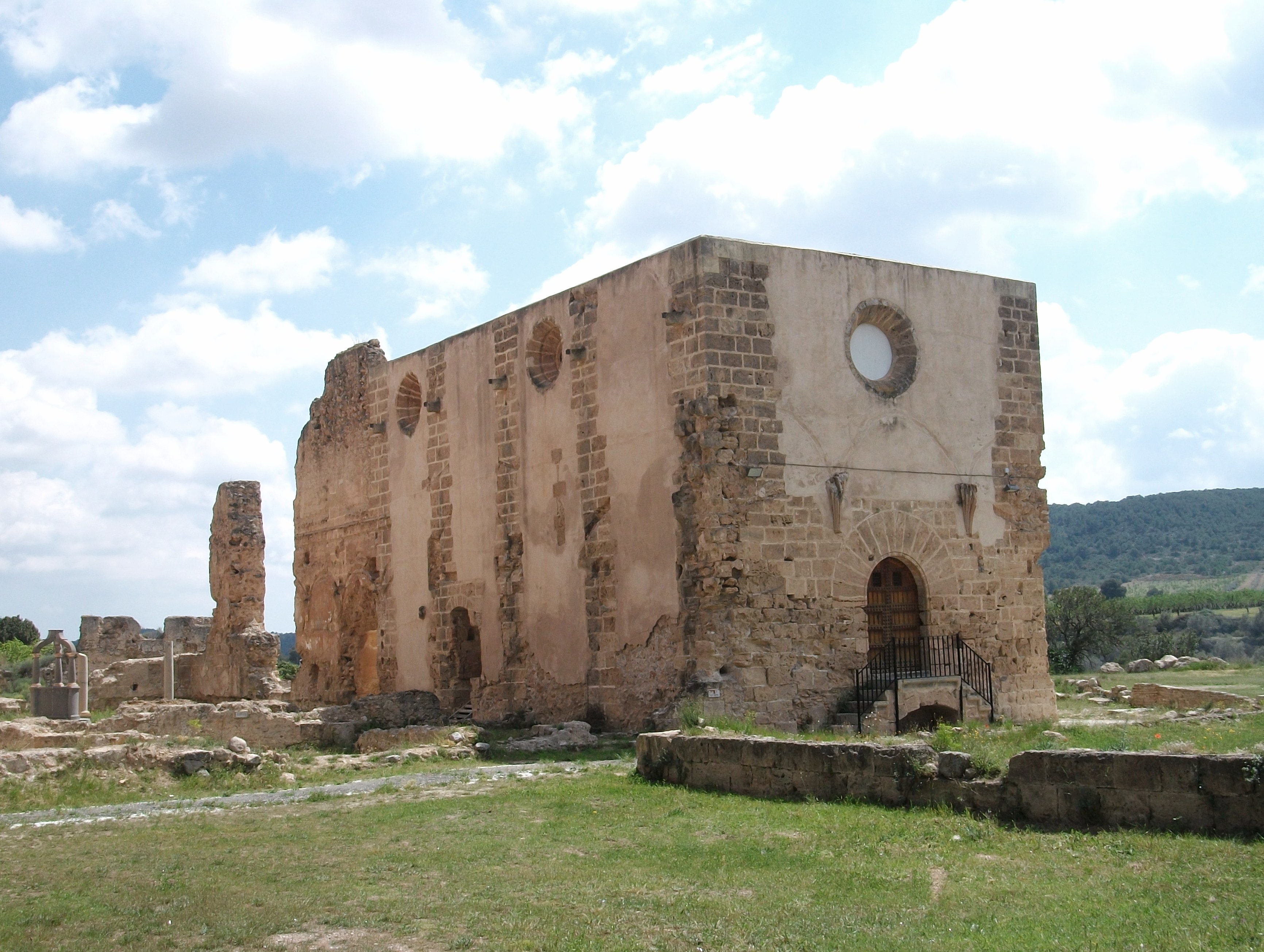 Capella de Sant Martí de la cartoixa de Valldecrist.